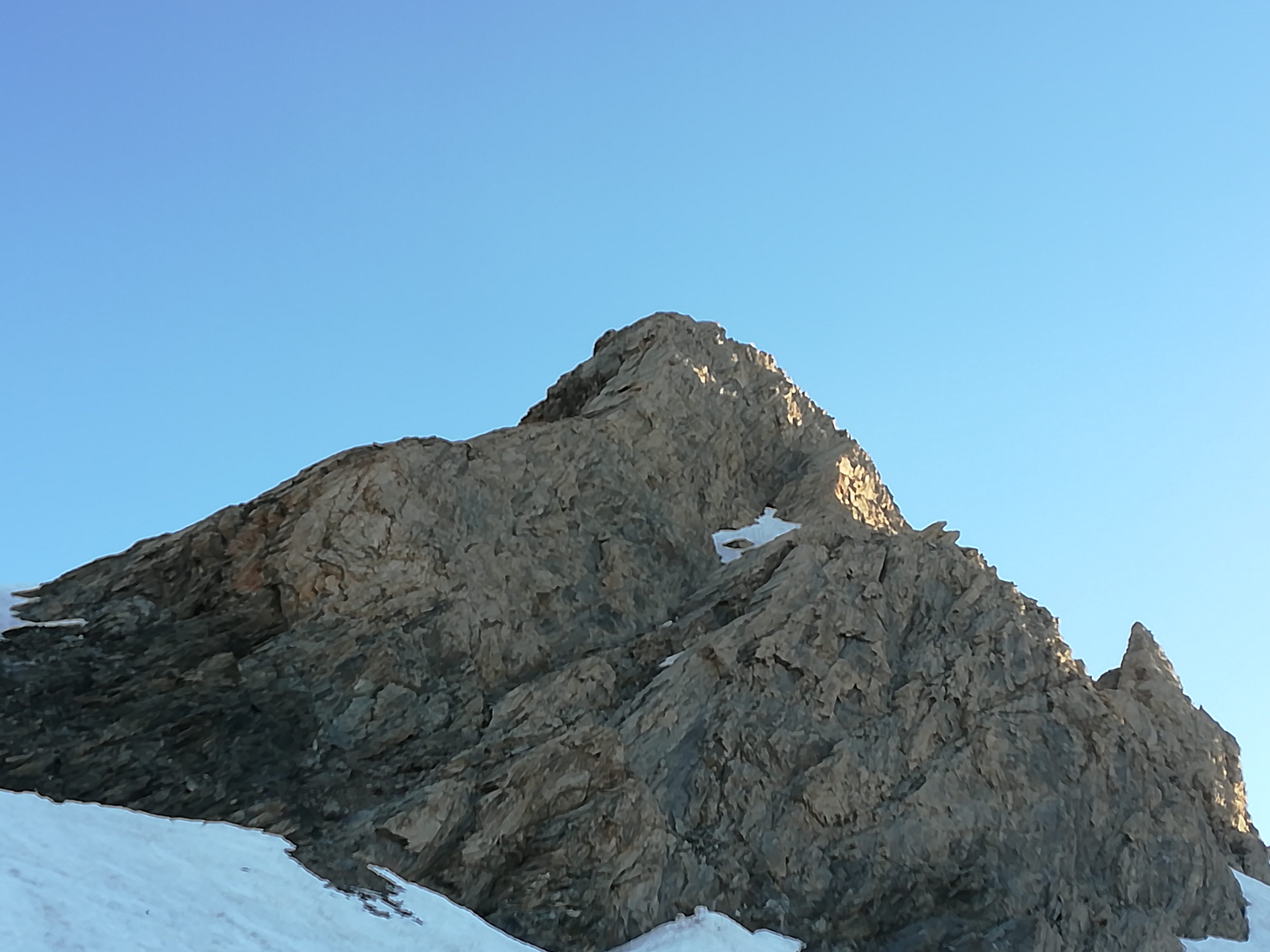 Il Pic d'Asti visto salendo al Col d'Asti dal versante italiano.